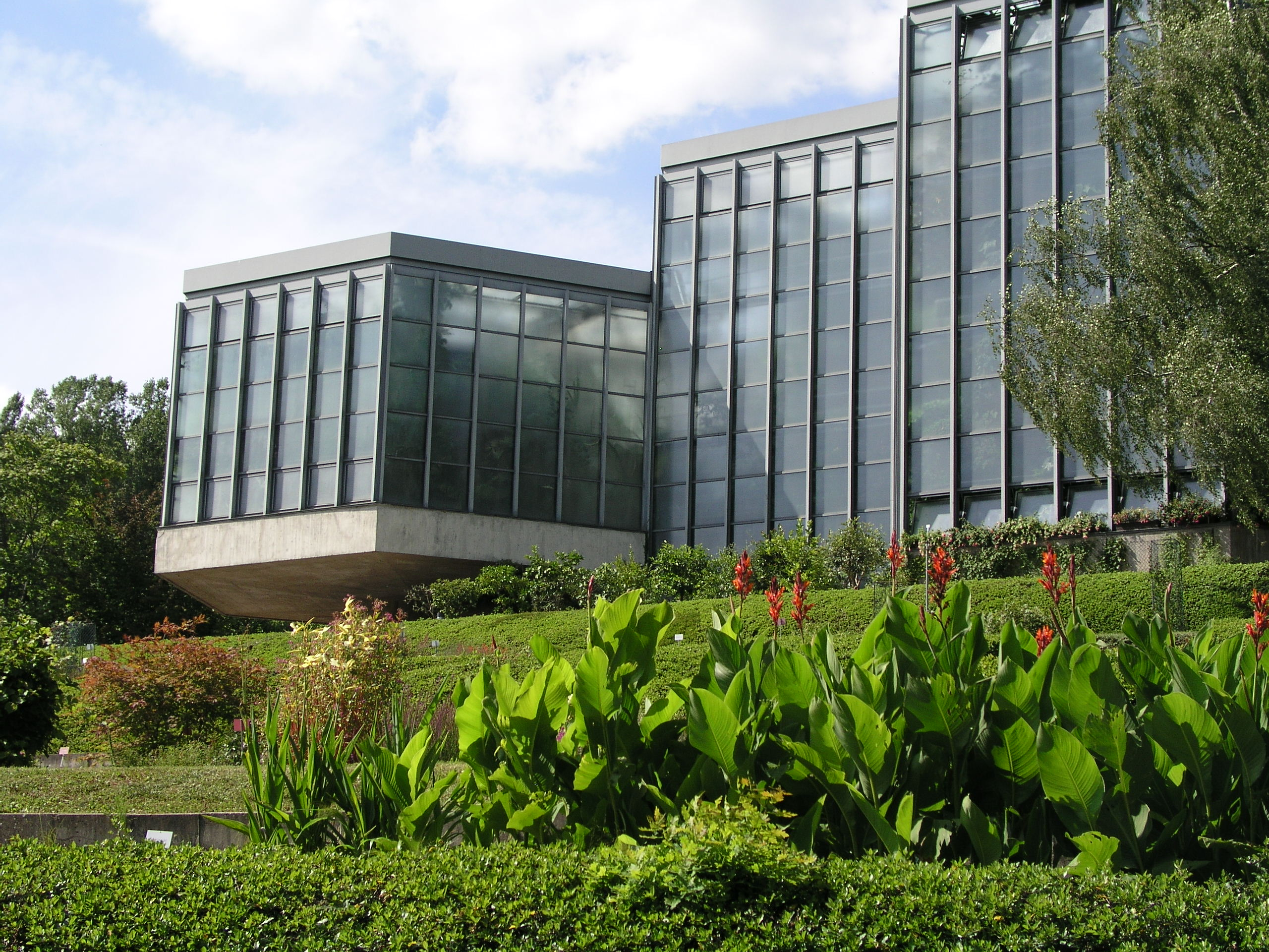 Neuer Botanischer Garten auf der Morgenstelle im Norden Tübingens.